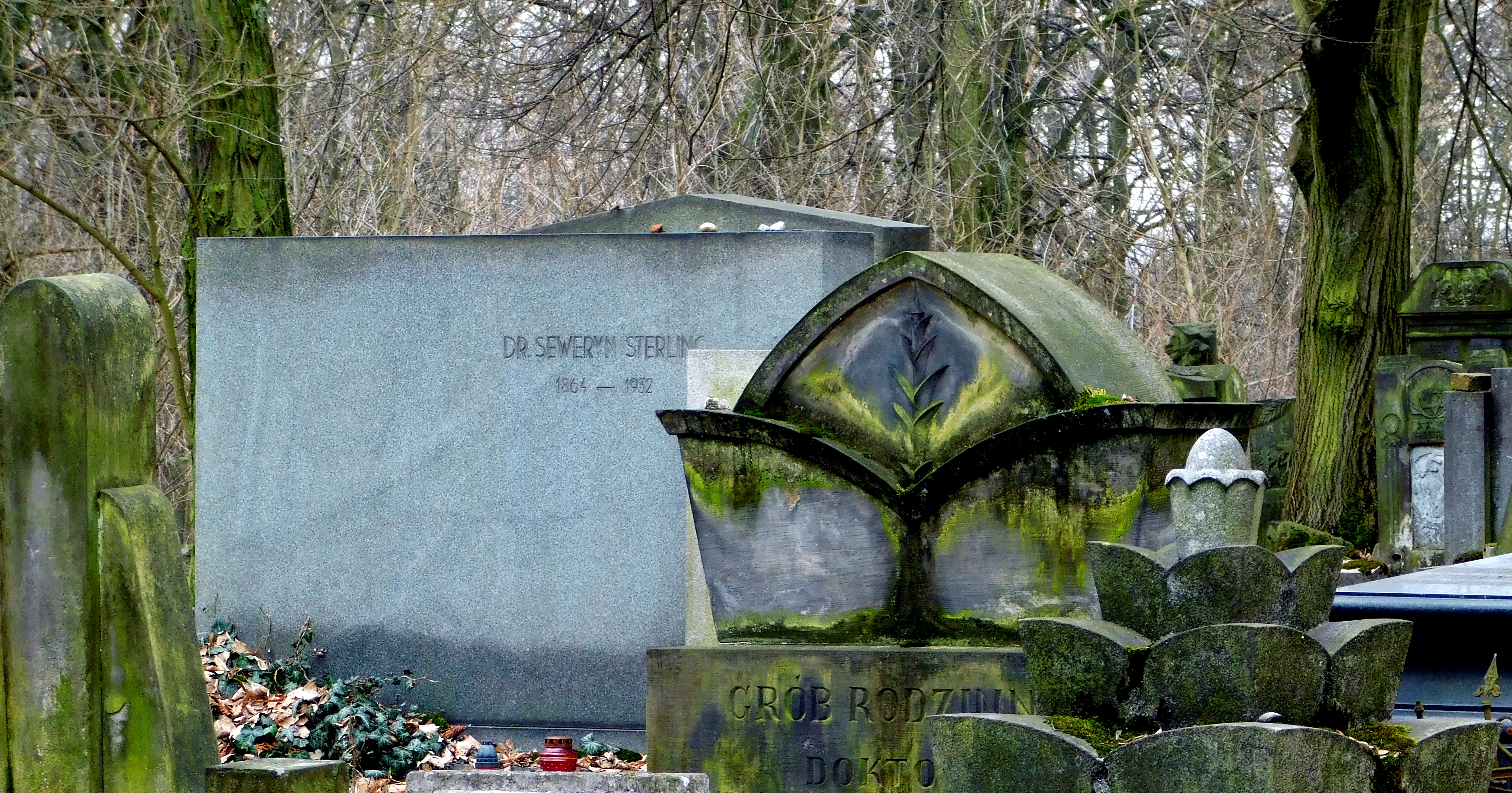 ŁÓDŹ (Лодзь, לודז'). Cmentarz żydowski. Jewish cemetery. Dr Seweryn Sterling and dr Maksymilian Kon gravesites.